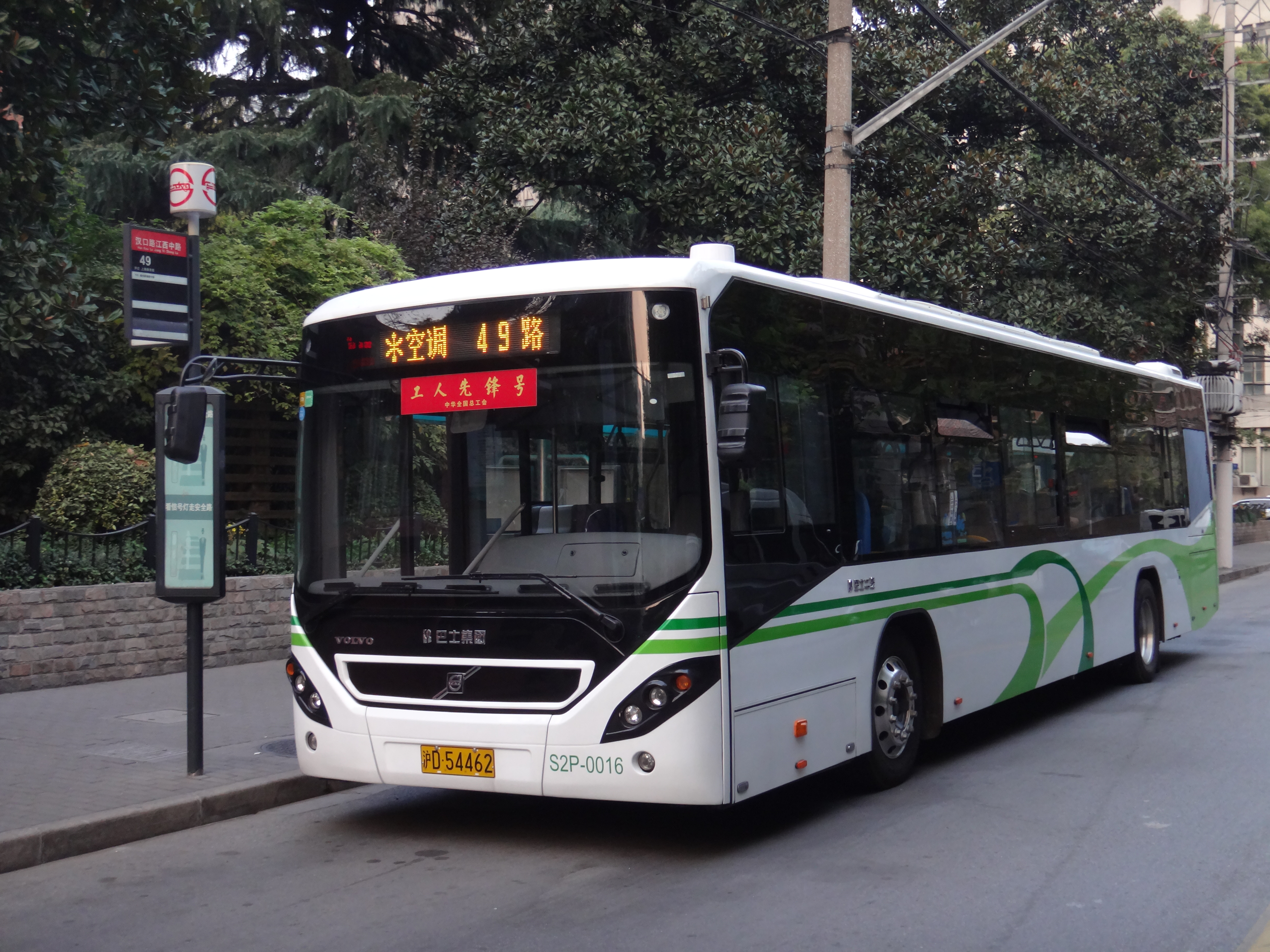 中文（中国大陆）: 上海公交49路，自编号S2P-0016，车型SWB6128V8LF，摄于汉口路江西中路。